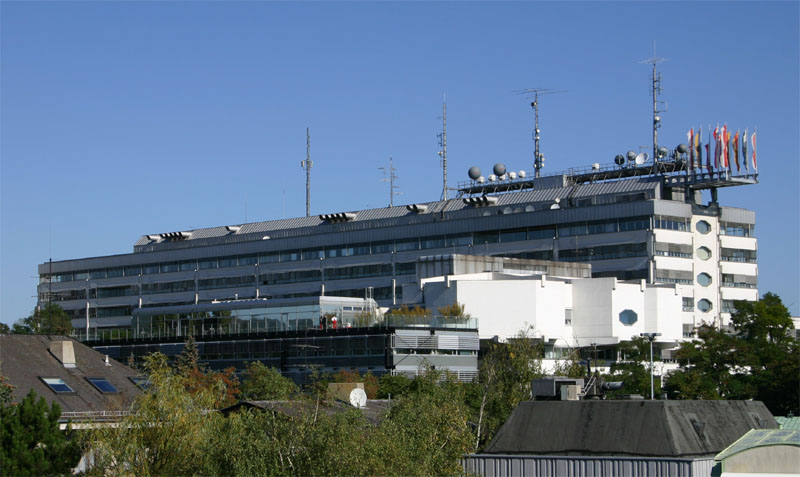 Beschreibung: ORF-Zentrum in Wien am Küniglberg Quelle: Fotografiert am 17.09.2004 Fotograf: Peter Gerstbach Lizenzstatus: GNU Freie Dokumentationslizenz